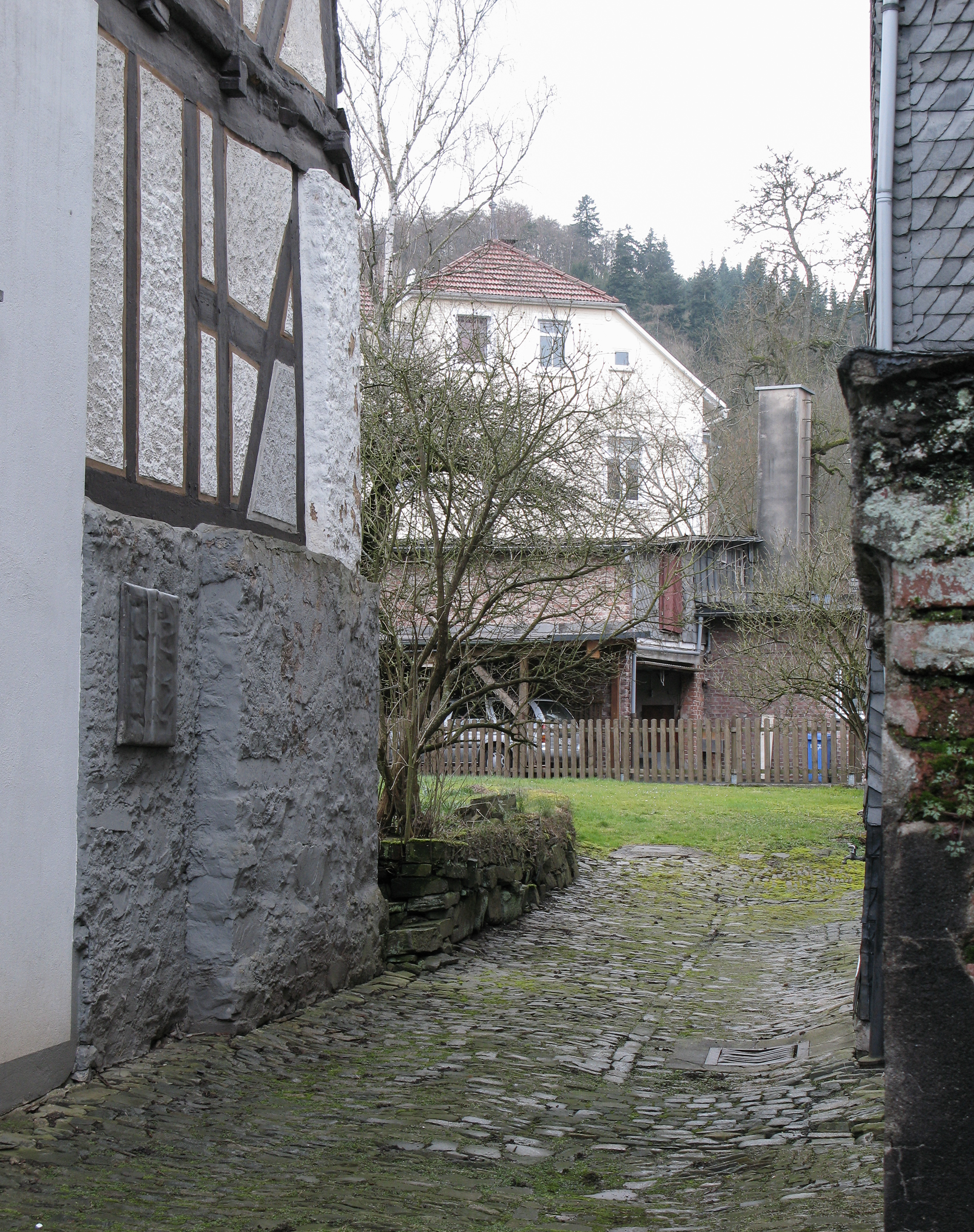 Bad Laasphe, historischer Stadtkern, historisches Bürgerhaus mit Rest der westlichen Stadtmauer